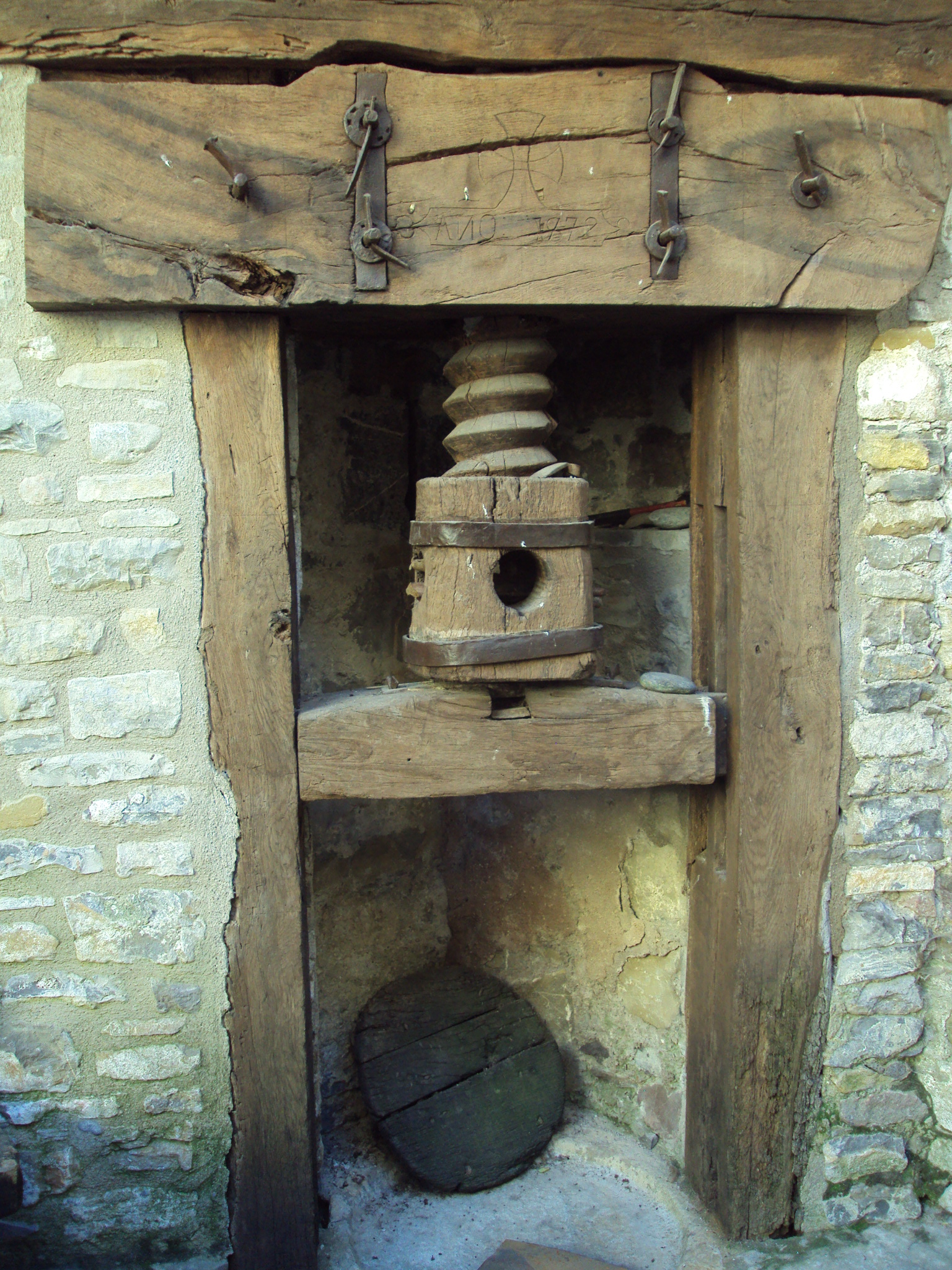 Antigua prensa de uvas en la Casa Mur de Aluján (Huesca, España).